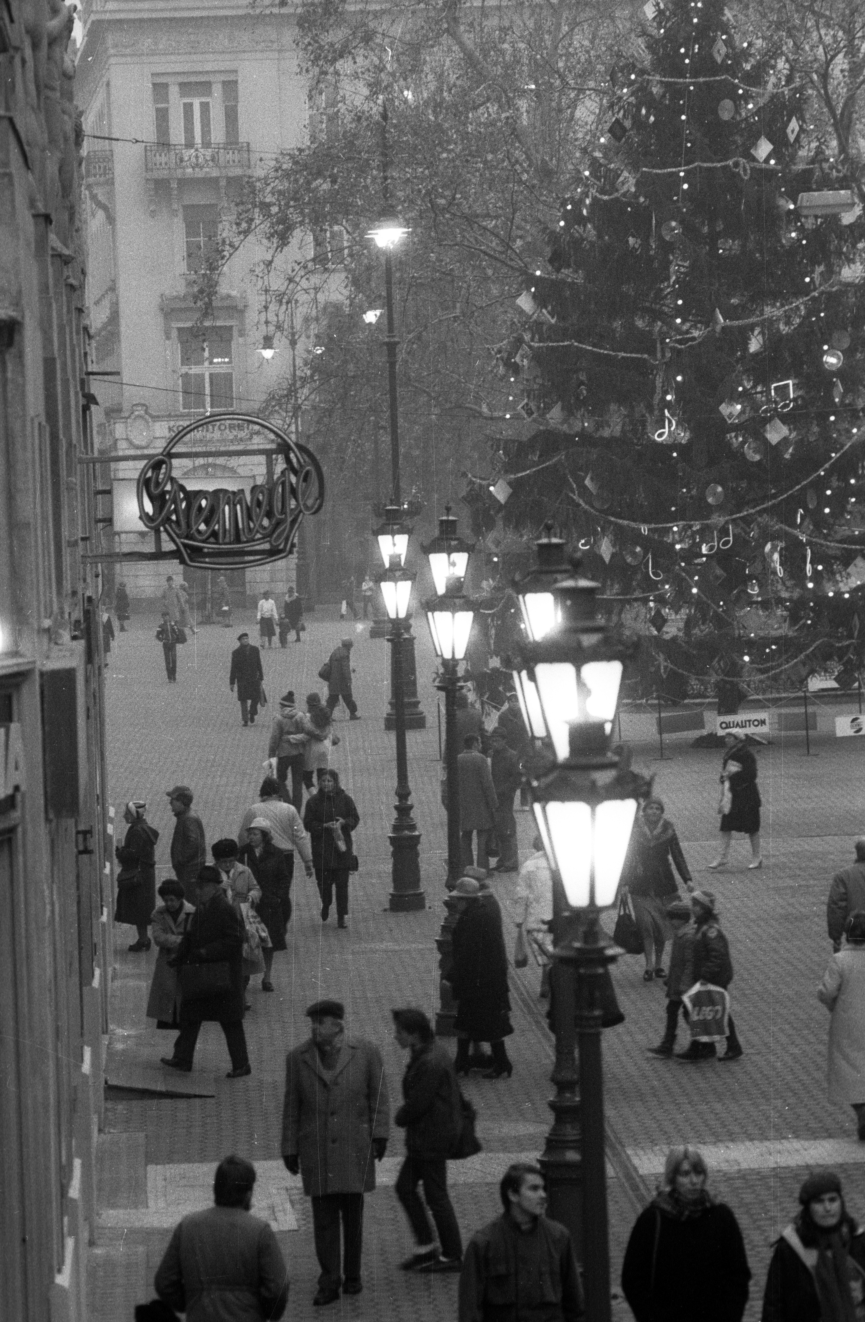 Váci utca, szemben a Vörösmarty tér. Location: Hungary, Budapest V. Tags: Christmas, Csemege enterprise, light, lamp post, winter, Budapest, neon sign Title: Váci utca, szemben a Vörösmarty tér.